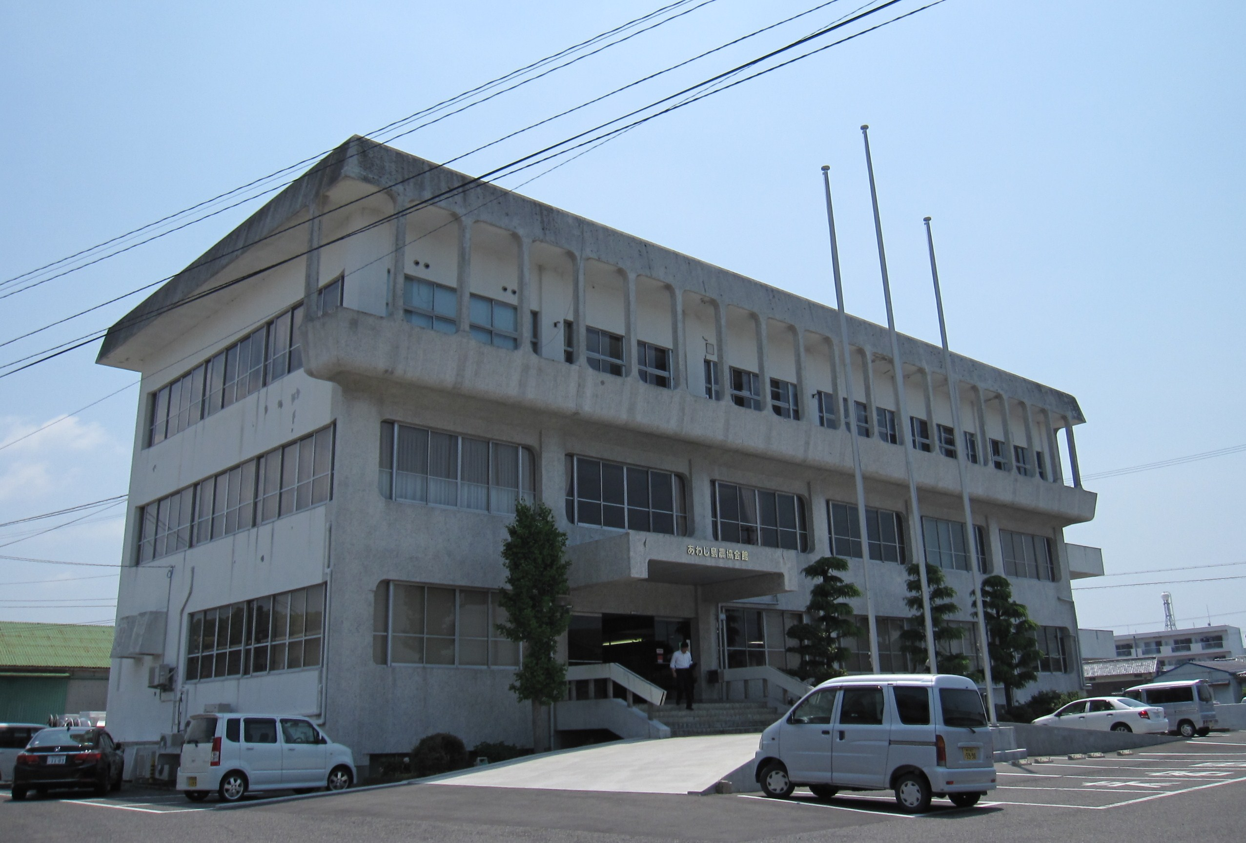 あわじ島農業協同組合本所